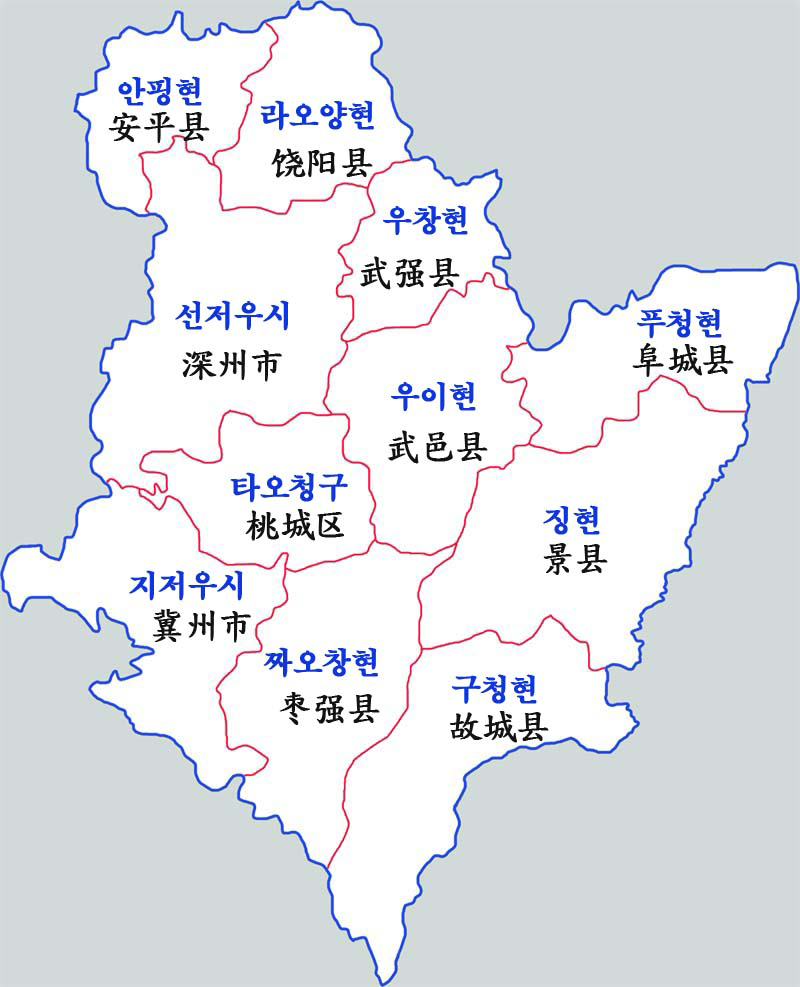 헝수이시 현급행정구역도